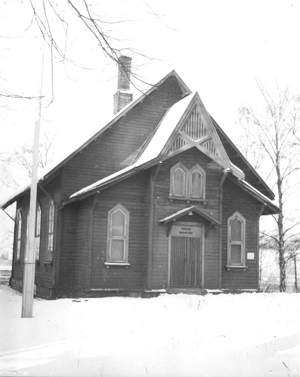 Nydalen kapell. Foto: Harry Lagert. Fra samlingen til Historielaget Grefsen Kjelsås Nydalen.